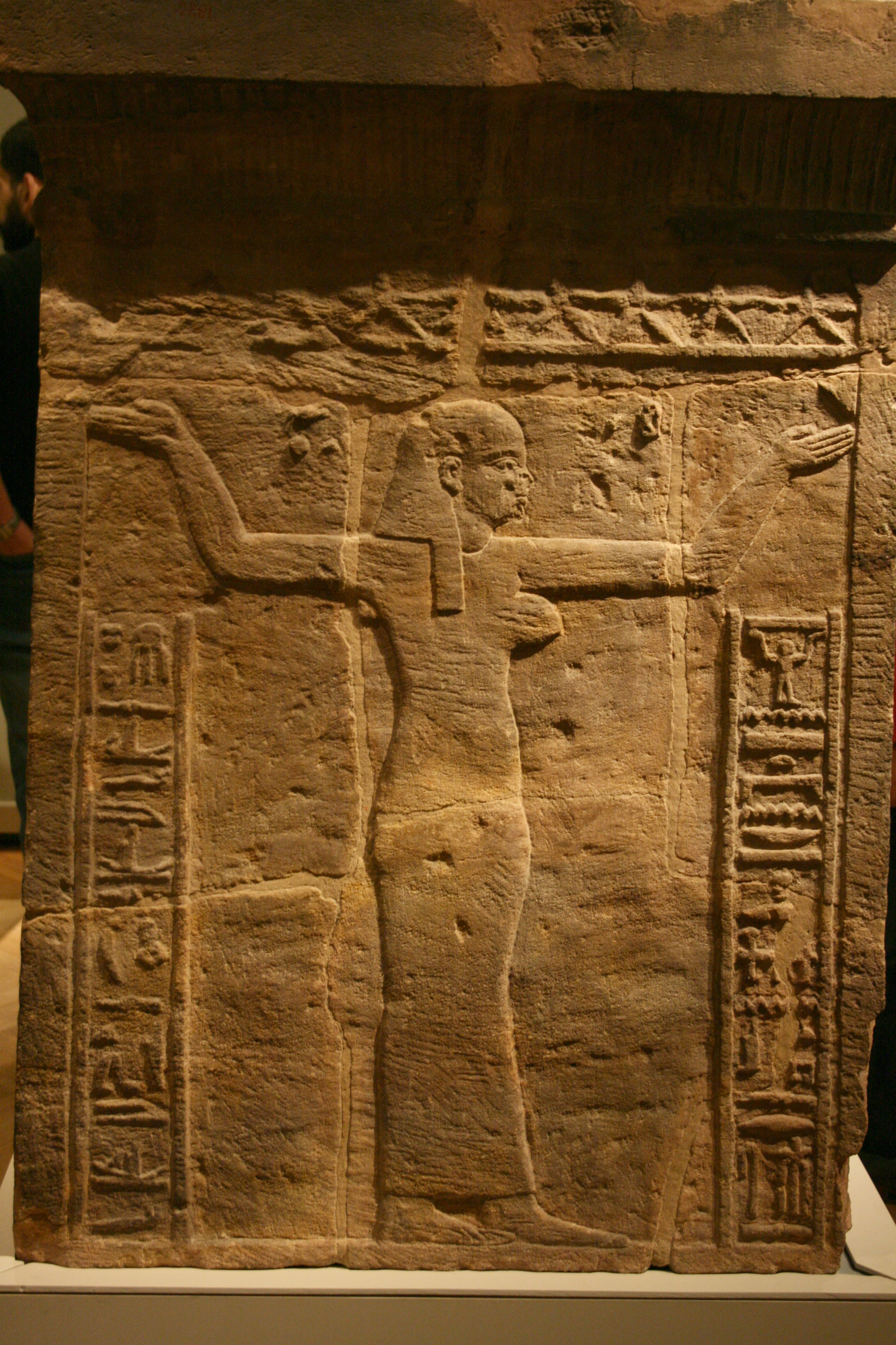 Barkenuntersatz des Natakamani und der Amanitore aus Wad Ban Naga (heute: Ägyptisches Museum Berlin, Inv. Nr. 7261)